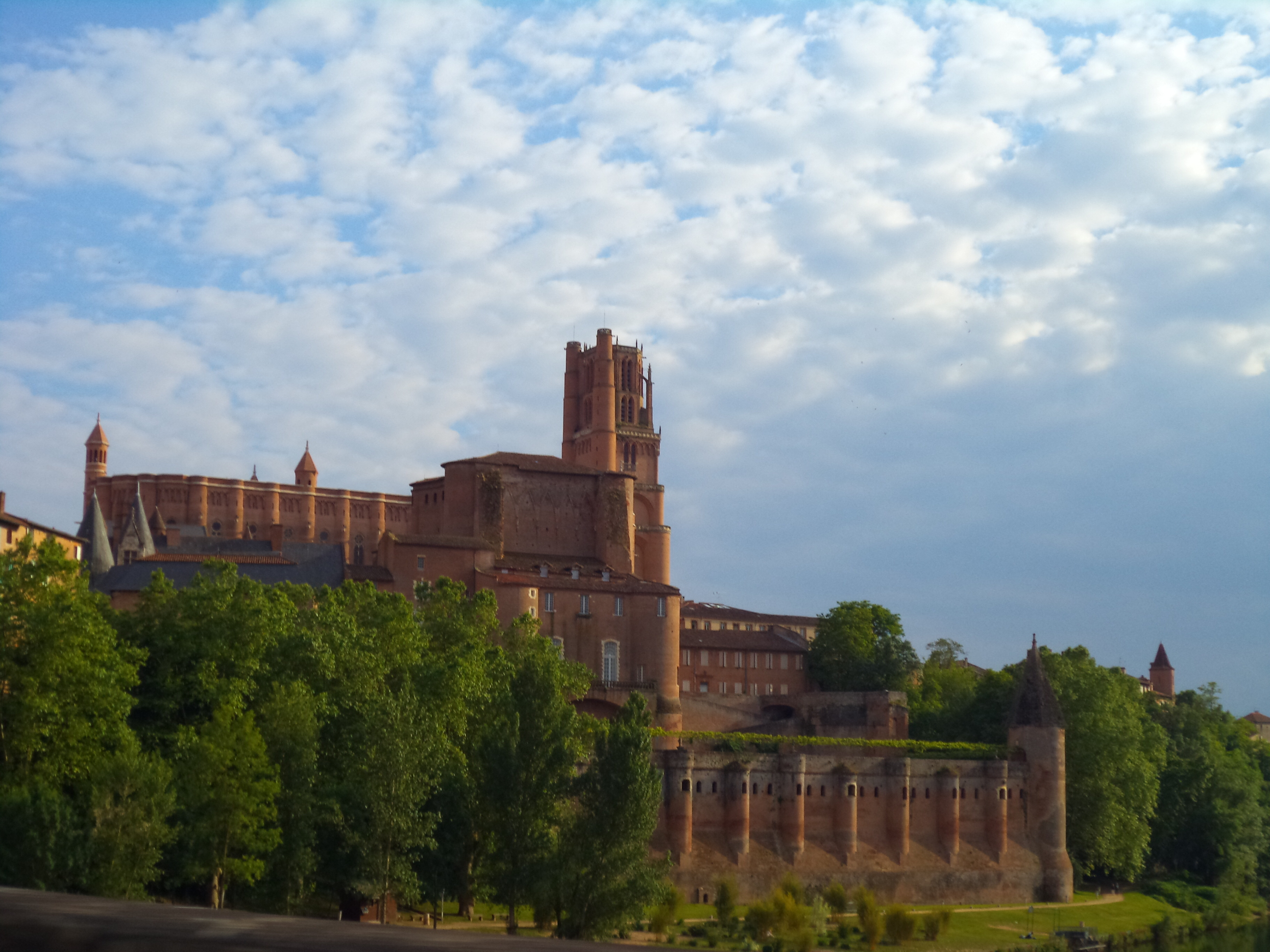 Cathédrale Sainte-Cécile et Palais de l'Evêché (ou Palais de la Berbie). Vue depuis le Pont-Vieux.